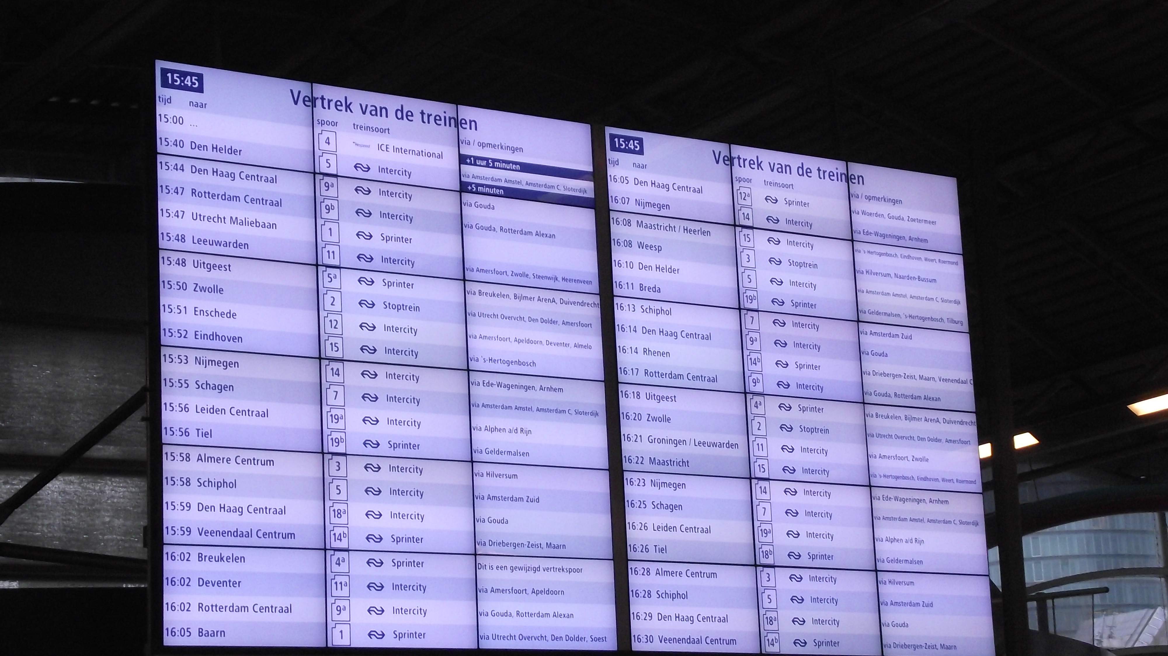 De nieuwe grote LCD display in Utrecht. De eerste van de LCD displays op deze maat.